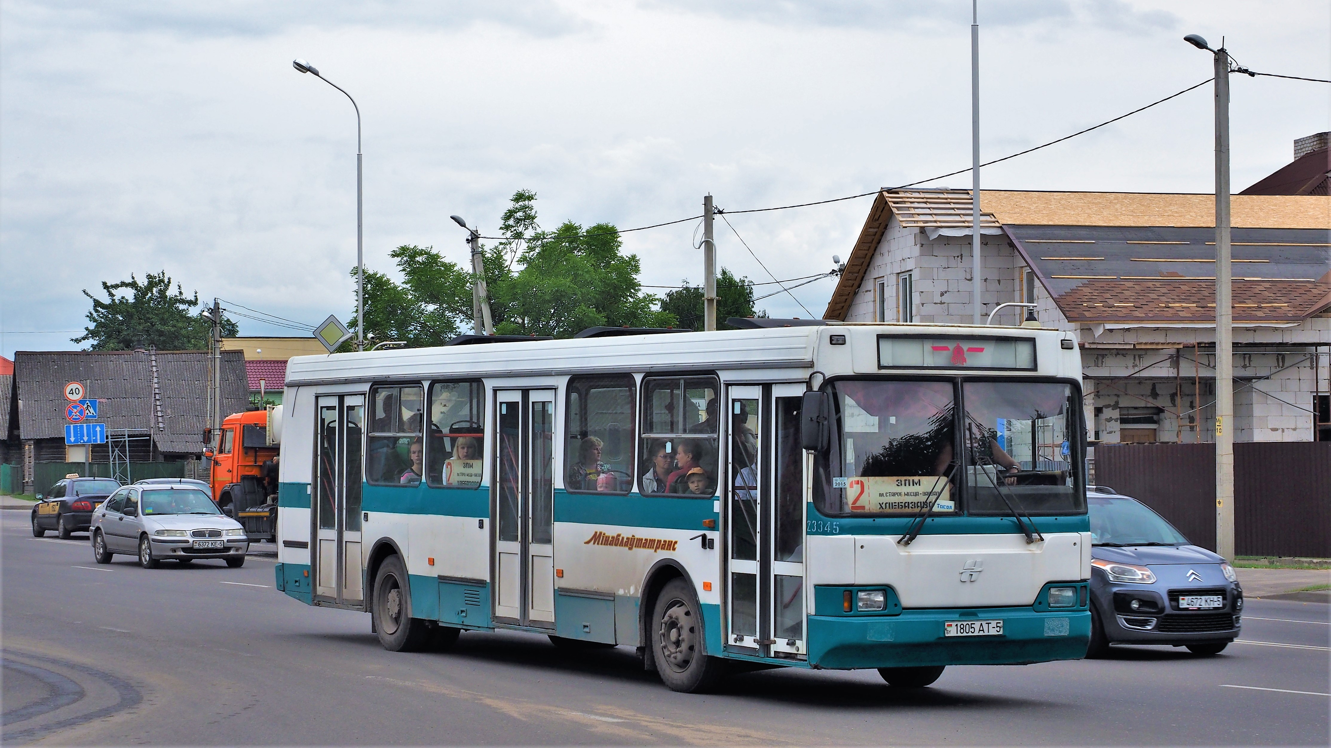 Maladzyechna, Belarus